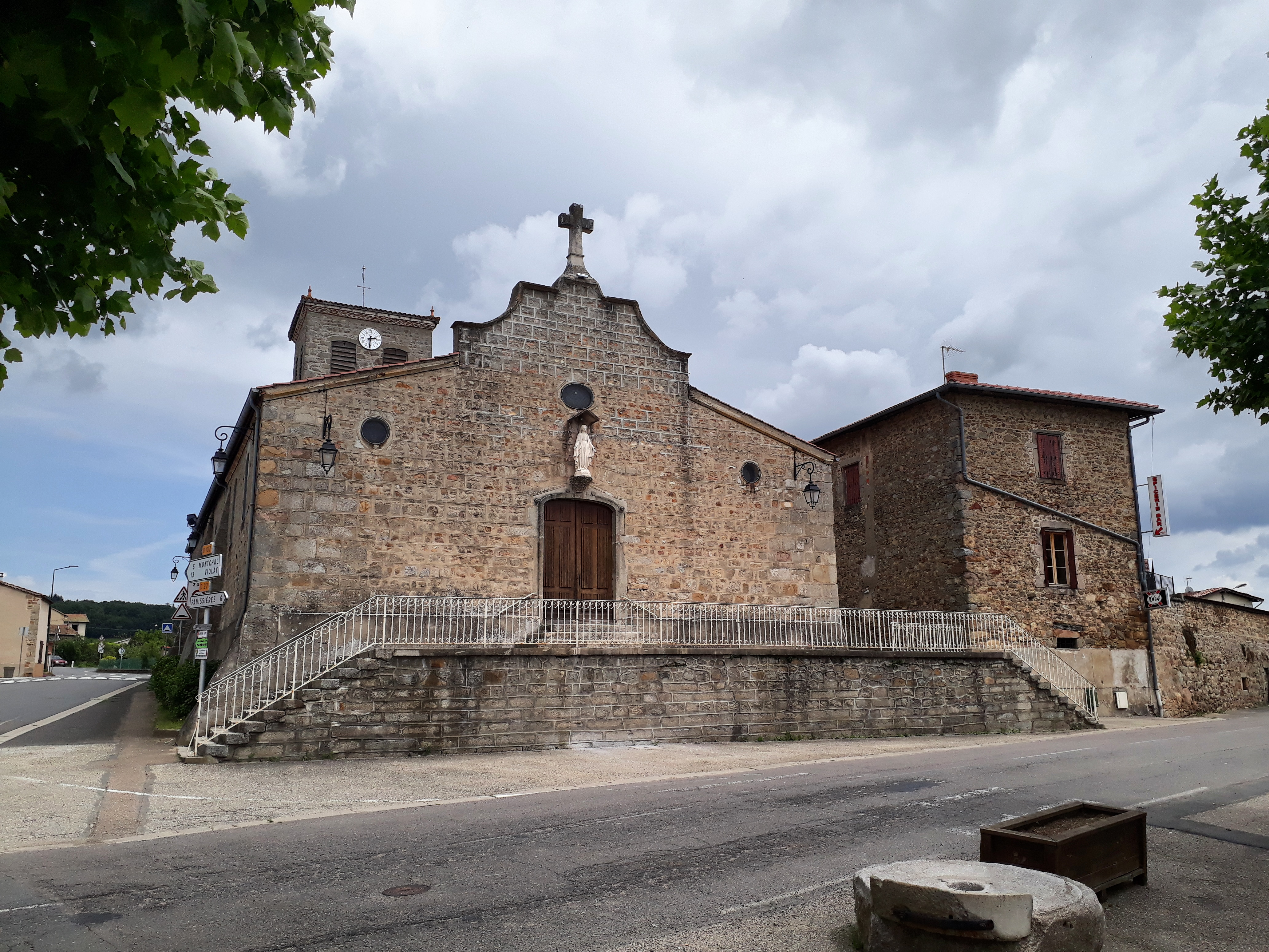 Eglise et Cure de Cottance